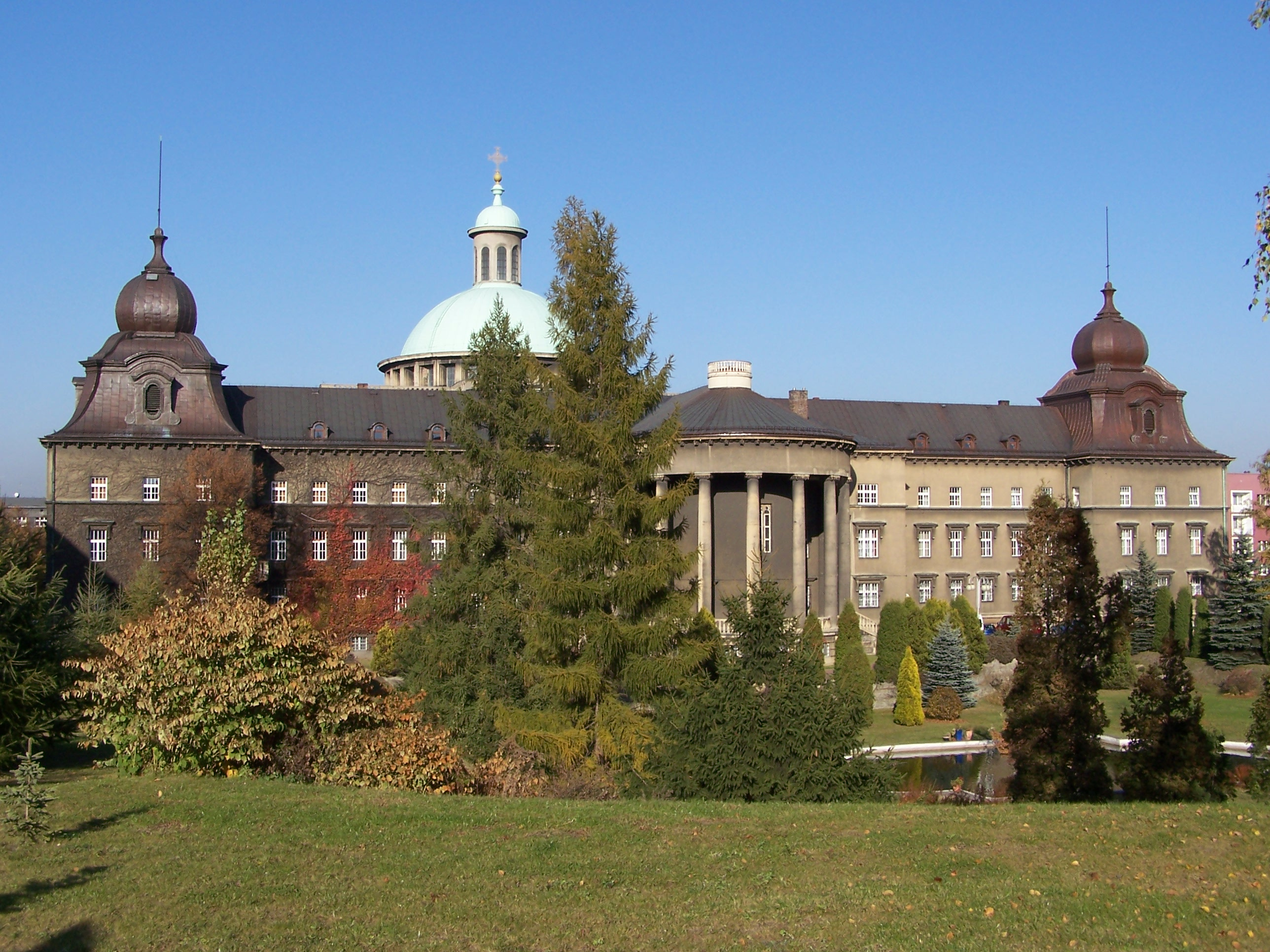 Die Gartenseite des Erzbischöflichen Palasts in Kattowitz.